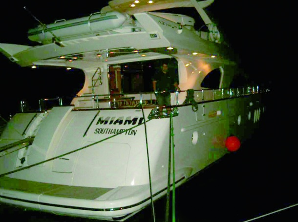 ск